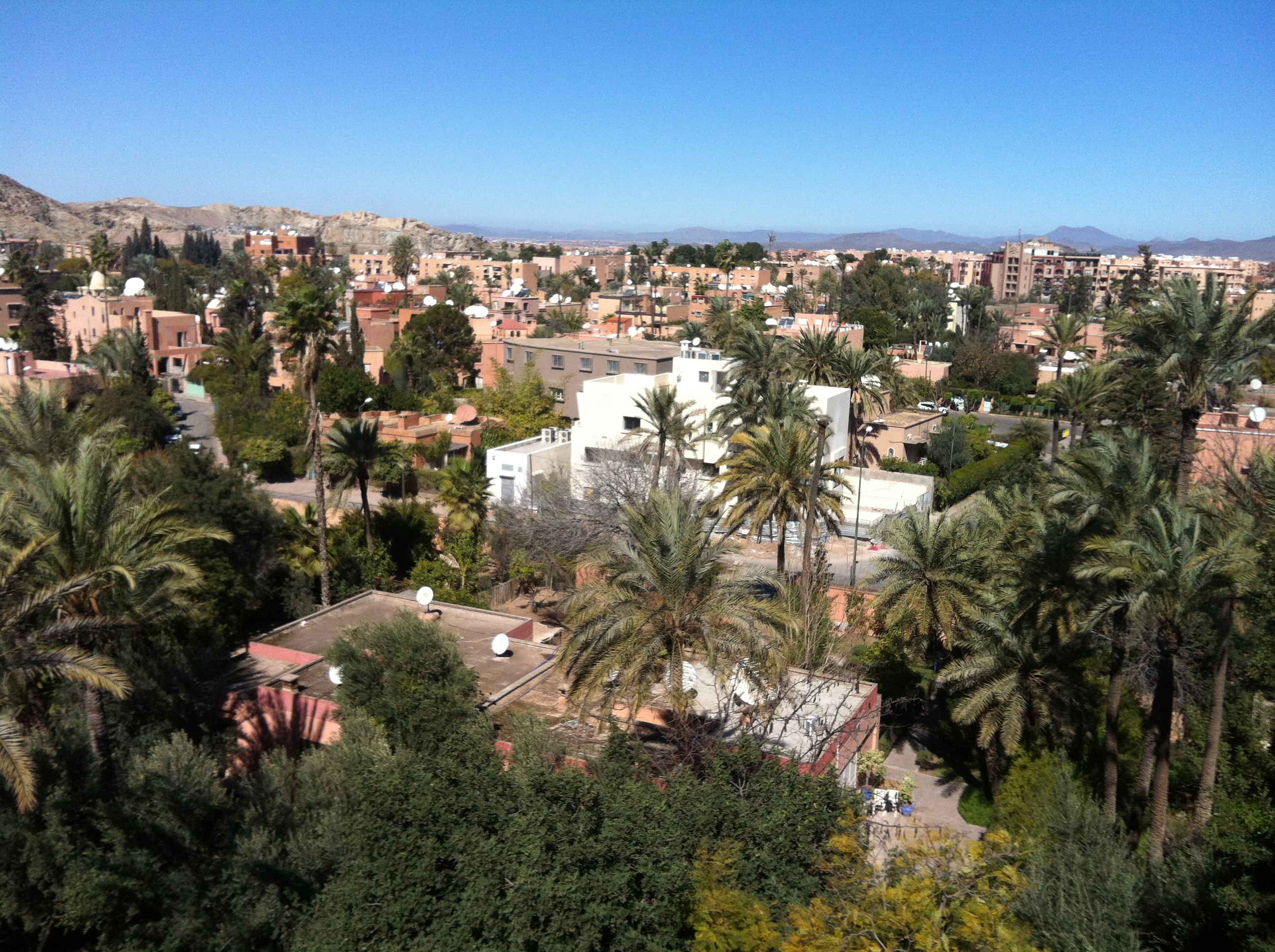 Image prenez a MARRAKECH